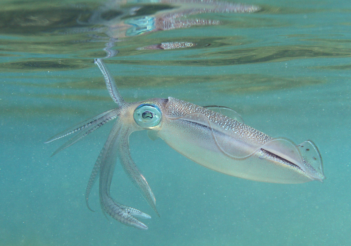 Le calmar de récif Sepioteuthis lessoniana à la Réunion.